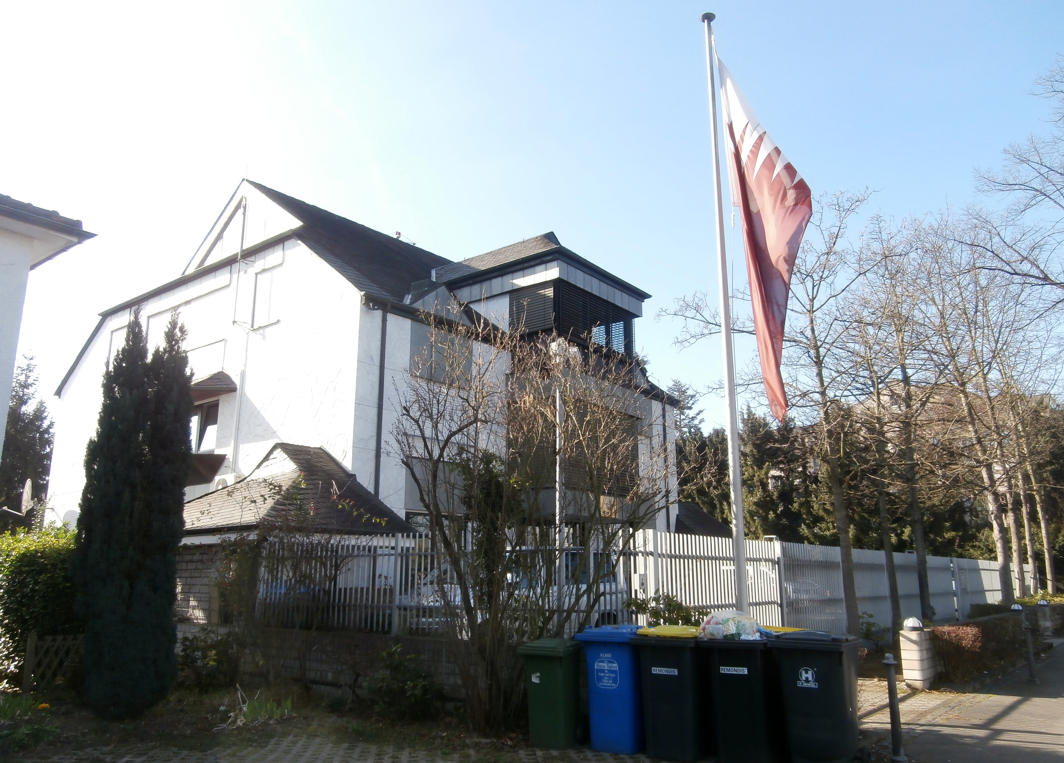 Außenstelle der Botschaft von Katar, Godesberger Allee 77–79, Friesdorf, Bad Godesberg